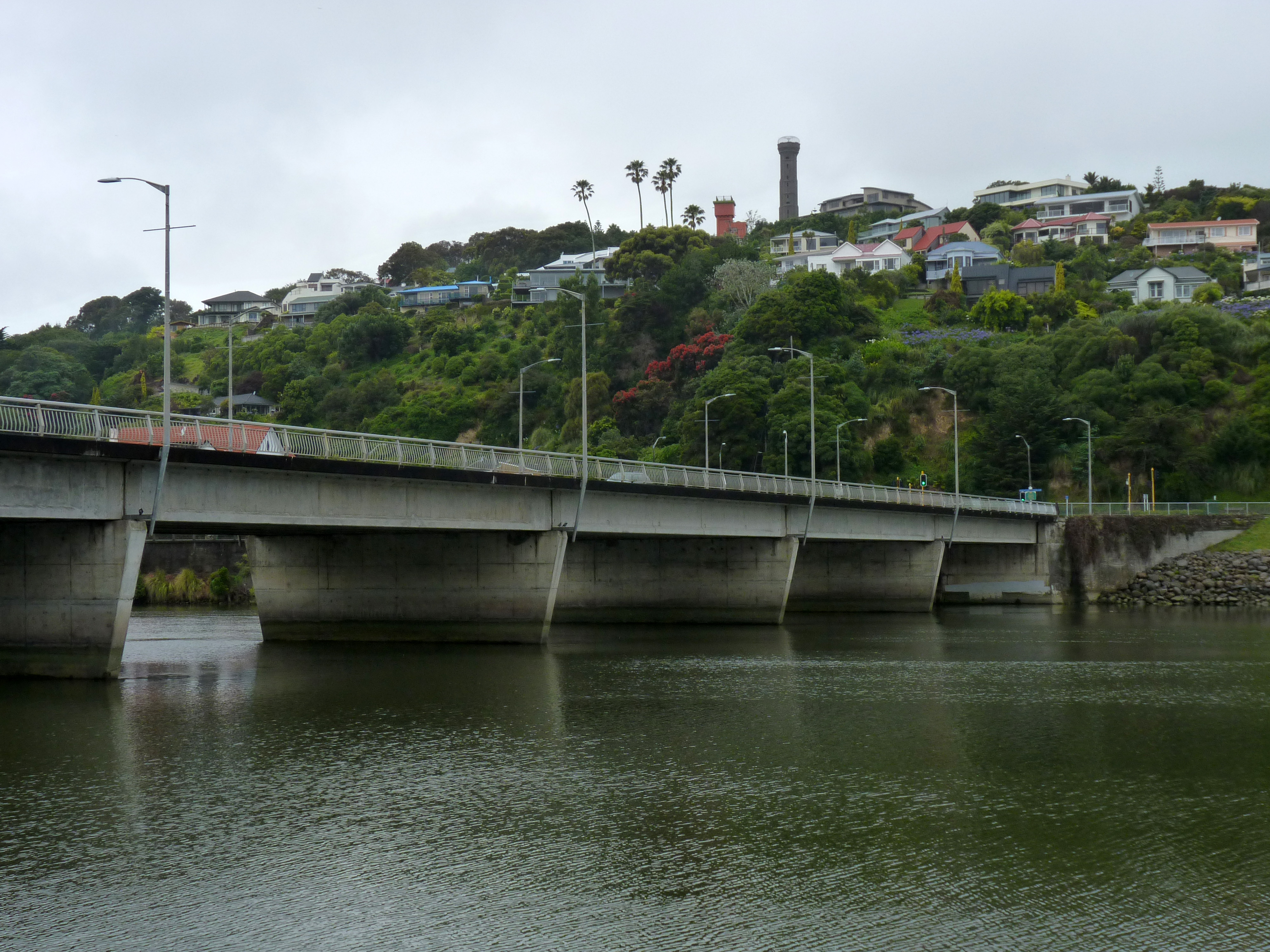 Whanganui